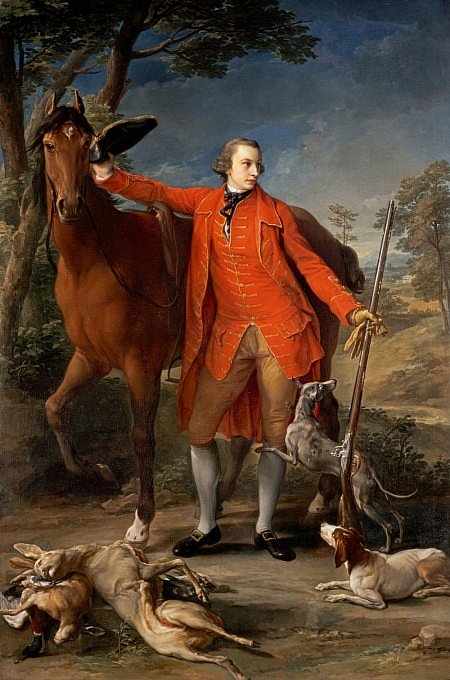 Portrait d'Alexandre 4e Duc de Gordon par Pompeo Batoni